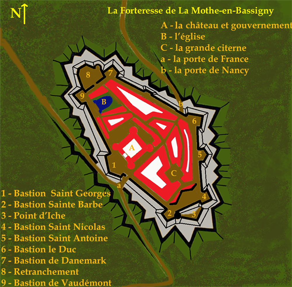 Plan de la Forteresse de La Mothe-en-Bassigny en Lorraine